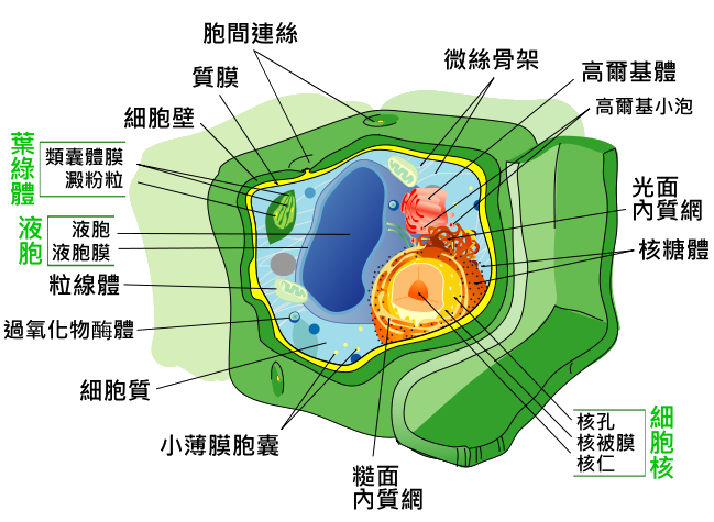 植物細胞的組織圖